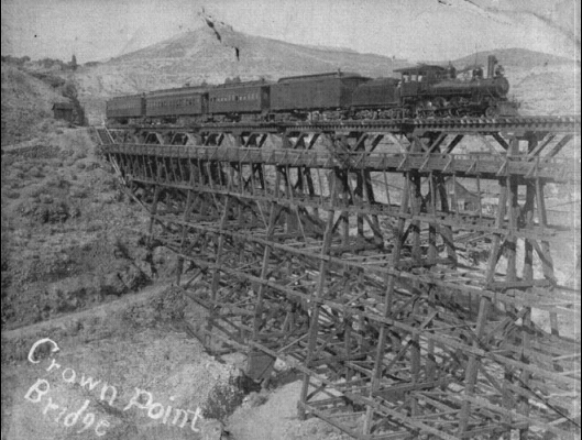 Puente de caballetes Crown Point Trestle. Acceso del ferrocarril Virginia & Truckee a Virginia City, Nevada